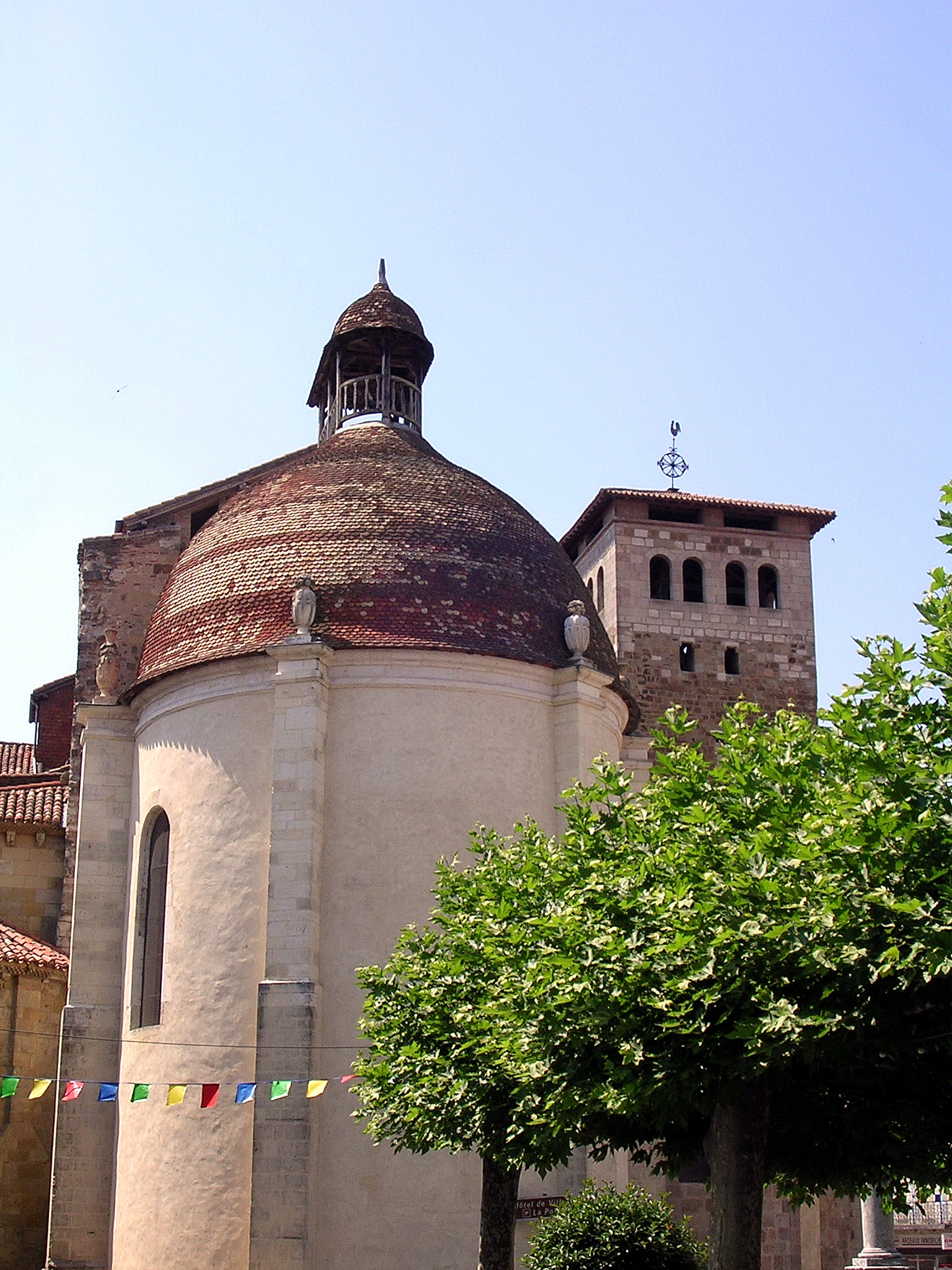 Abbaye bénédictine de Saint-Sever, dans les Landes (France) Photo prise par Jibi44 en juillet 2006